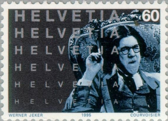 Michel Simon in "La Vocation d'André Carrel" (1925)